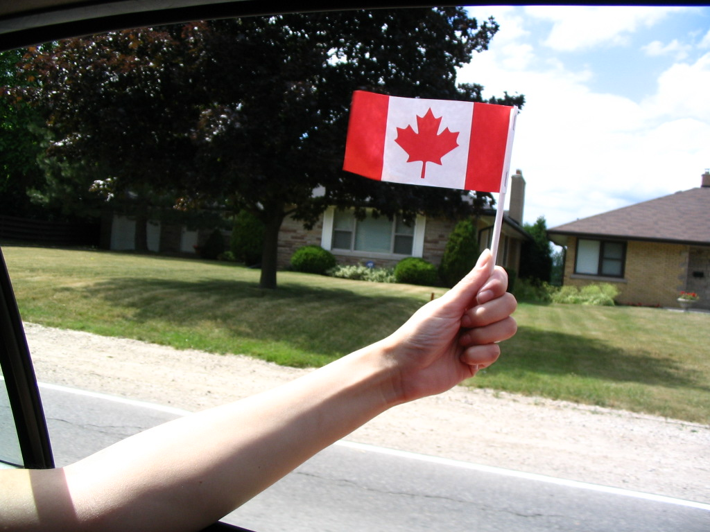 Canadaday